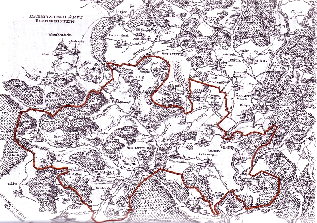 Das Gericht Lohr (Fronhausen & Lohra) im Spät-Mittelalter